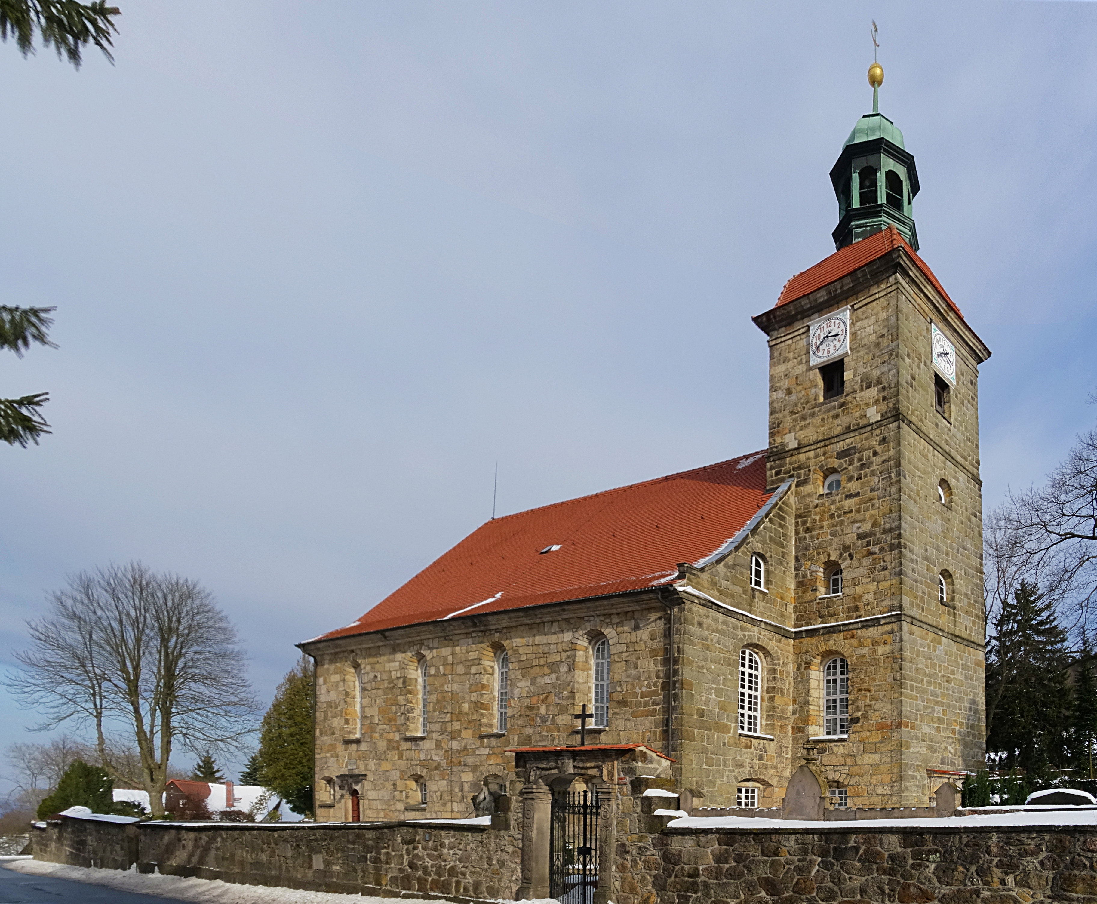 Jonsdorfer Kirche